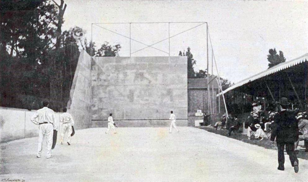 Le Fronton de Neuilly (pelote basque) durant les JO 1900